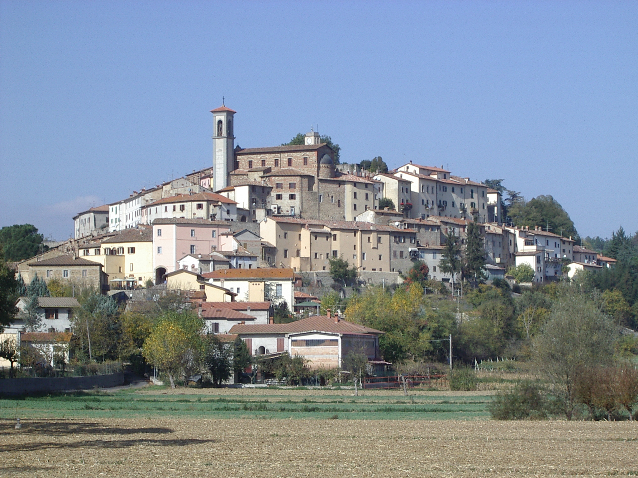 Monterchi (vue depuis la plaine), Toscane, Italie